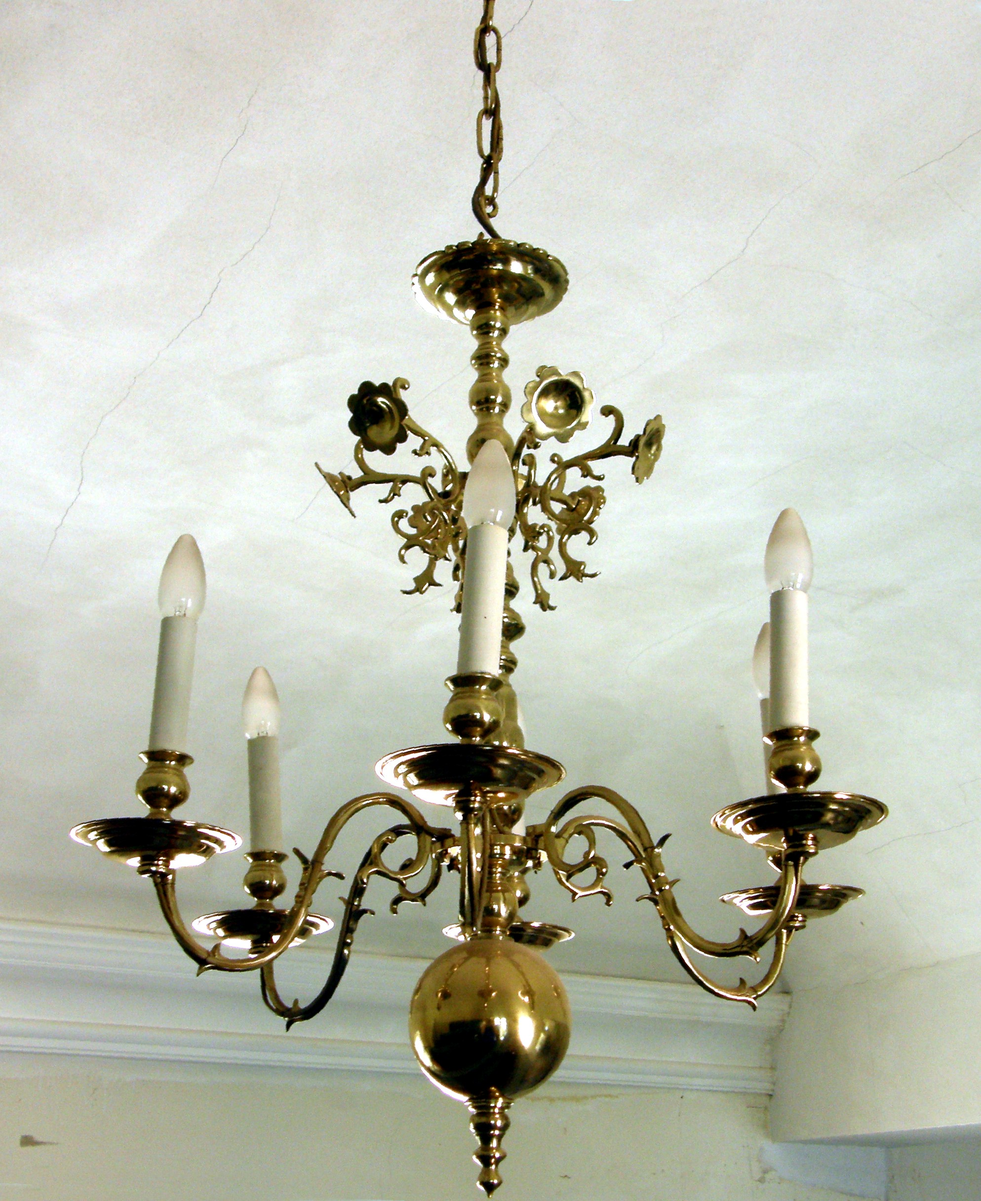 Flämischer Kronleuchter, Dinanderiearbeit, Dorfkirche Seegefeld, Falkensee, Deutschland